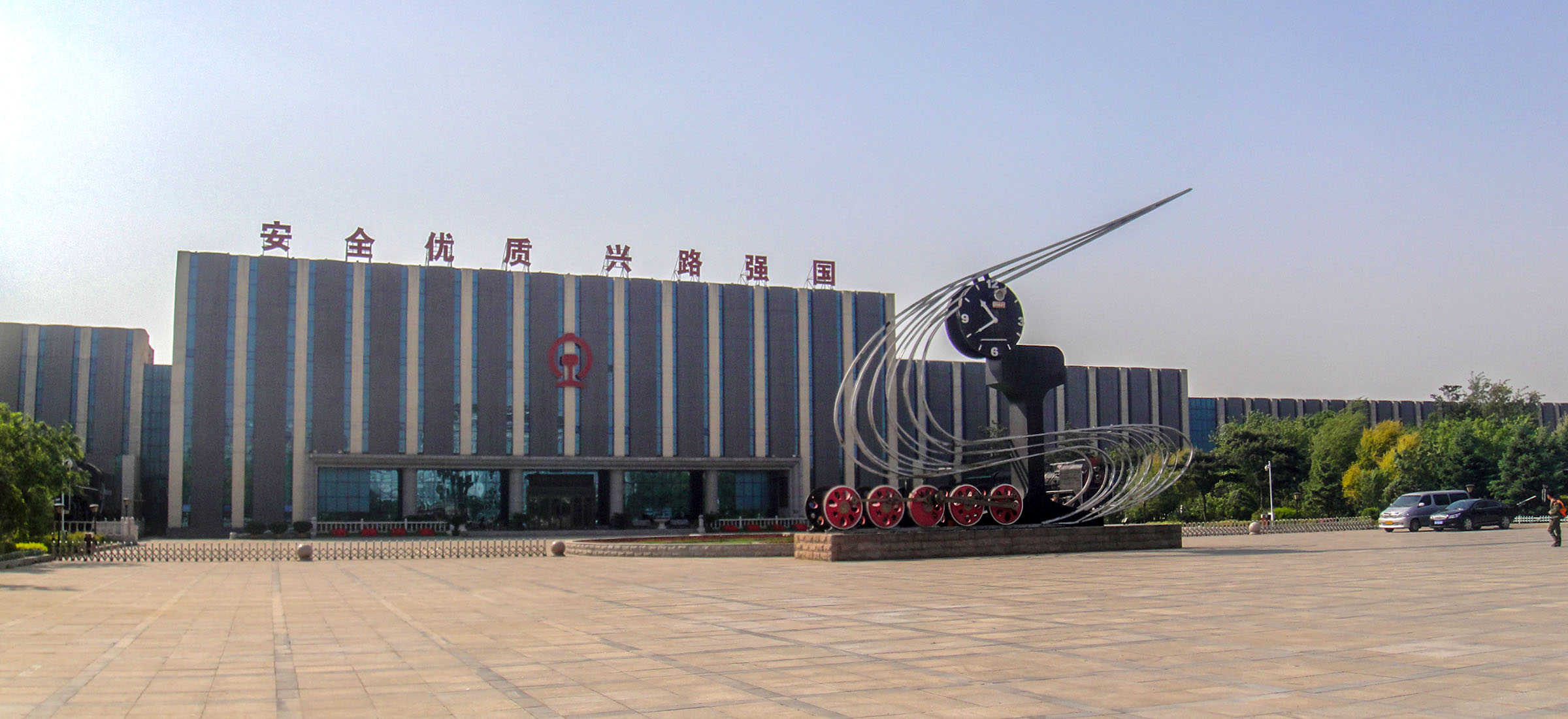 沈阳铁路陈列馆